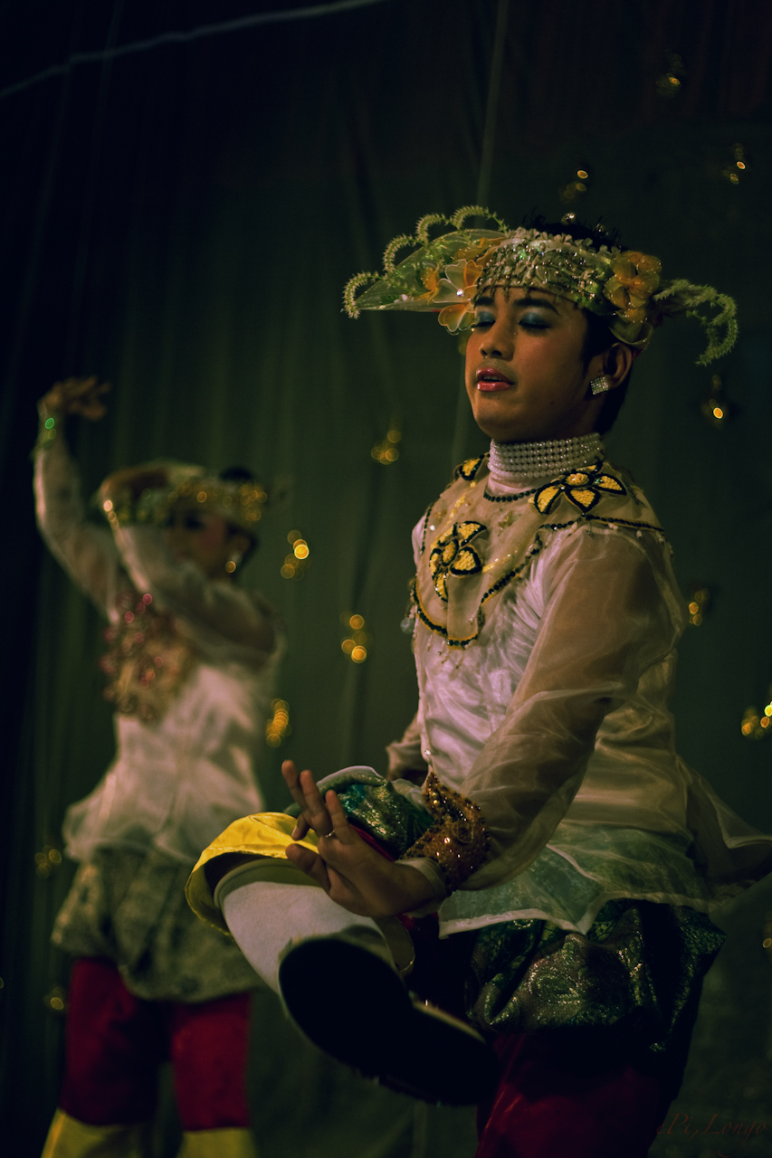 Traditional Burmese dance